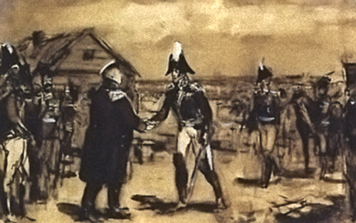 Bagration meets Kutuzov at Schöngrabern